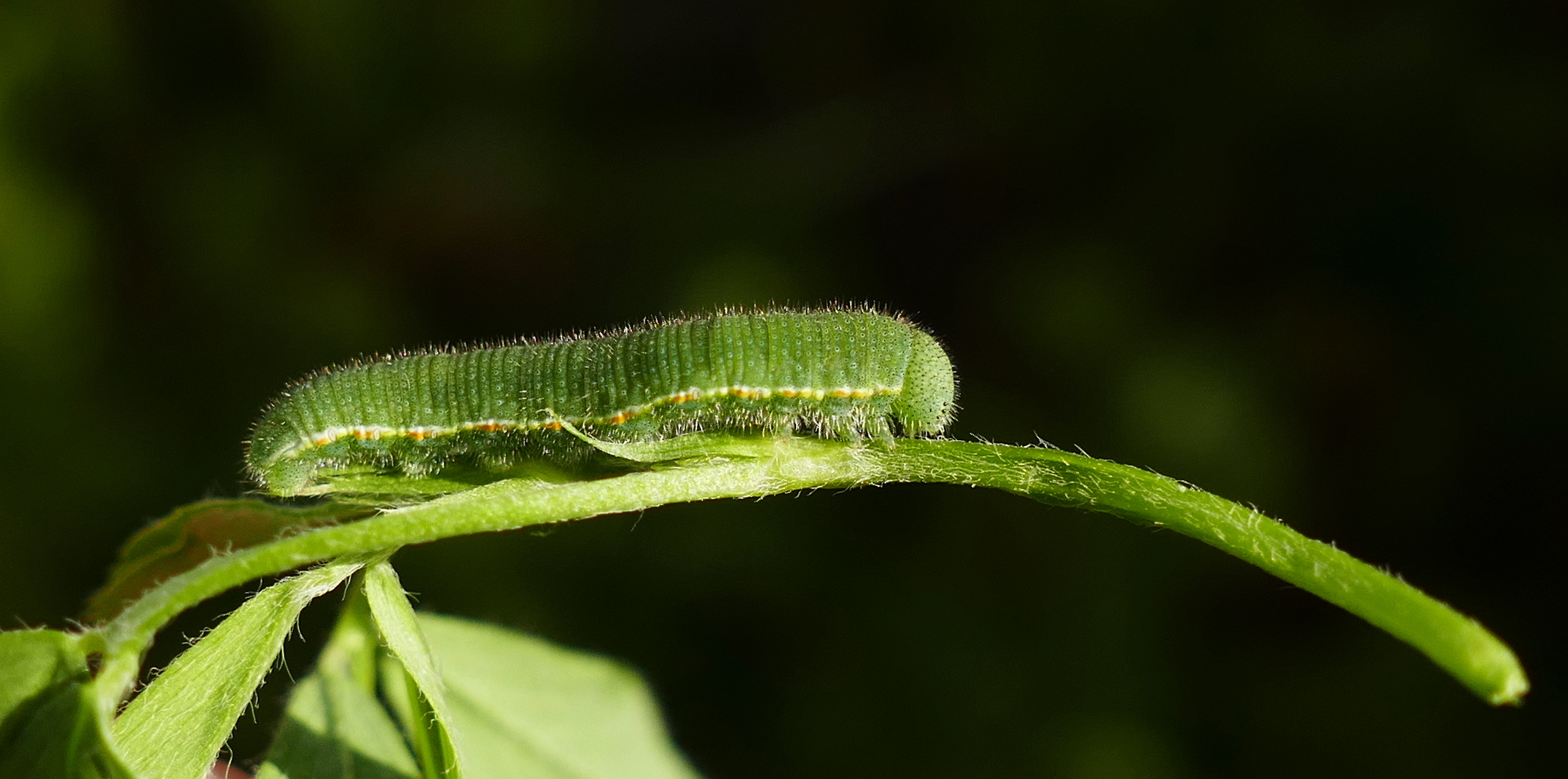 Rups van gele luzernevlinder